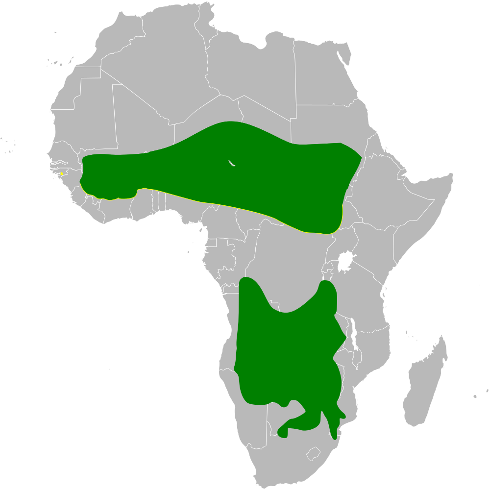 Pinarocorys distribution map